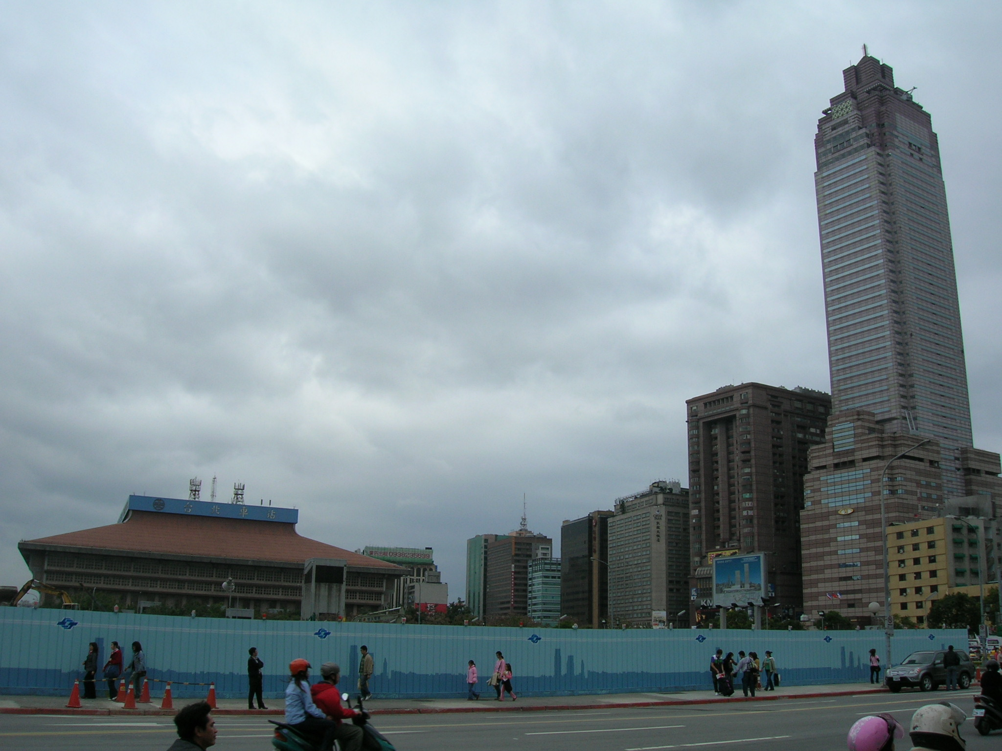 台北車站與桃園國際機場捷運工地。